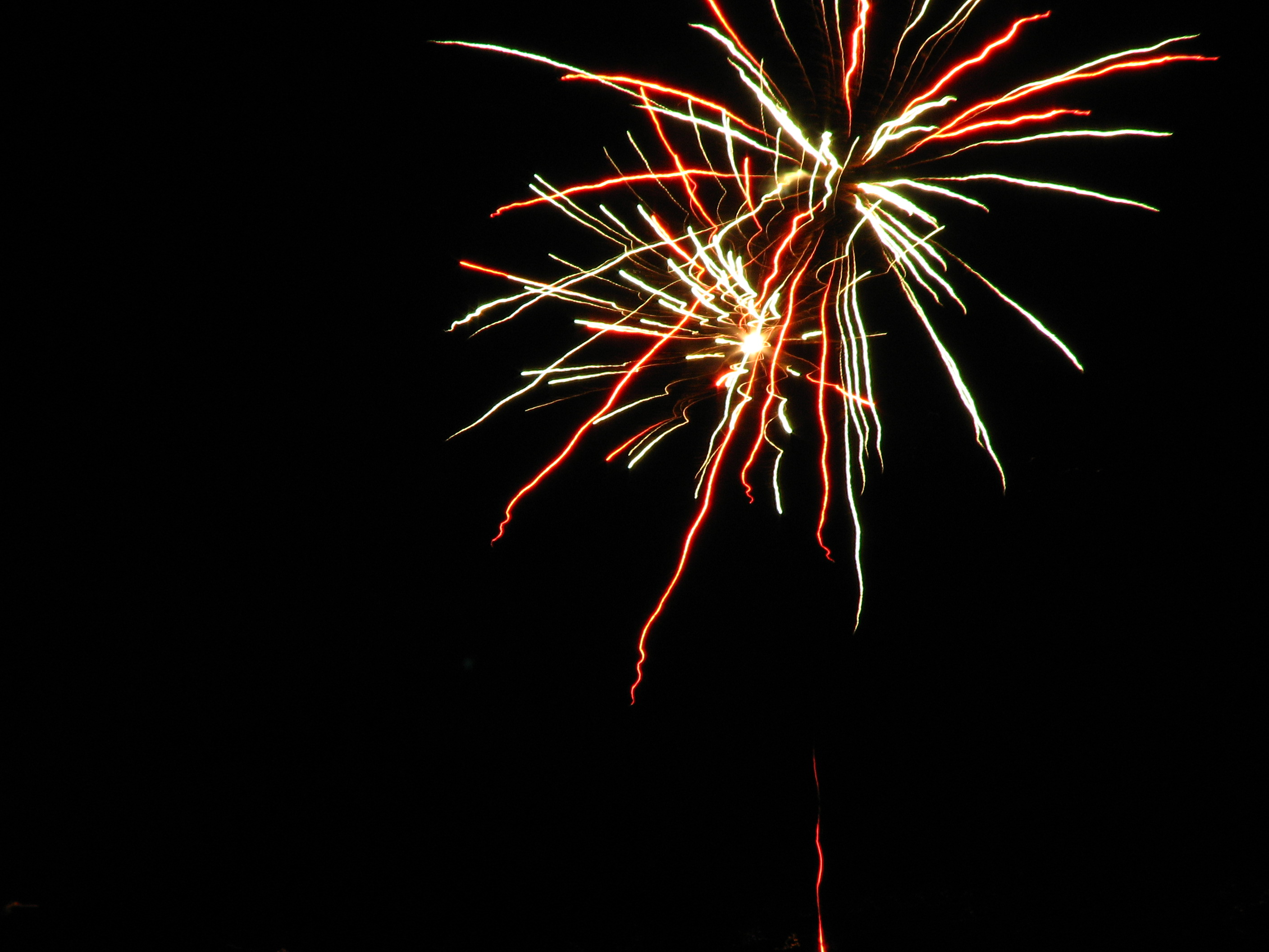 Sztuczne ognie w Sylwestra 2006/2007 w Krakowie